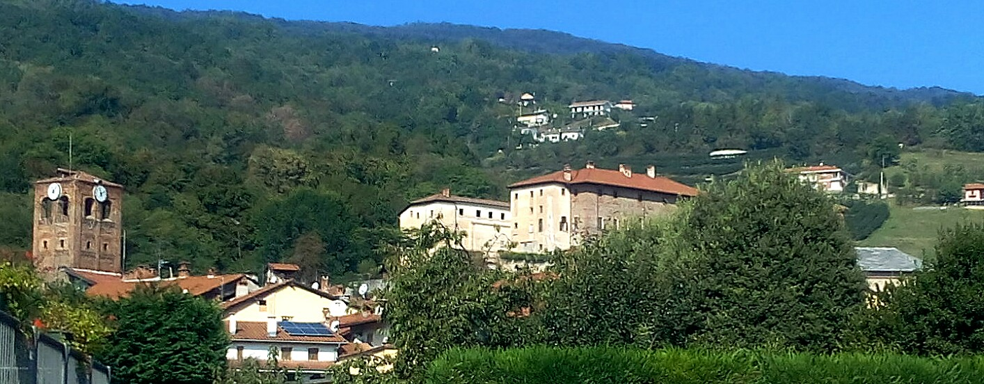 Piasco (CN)